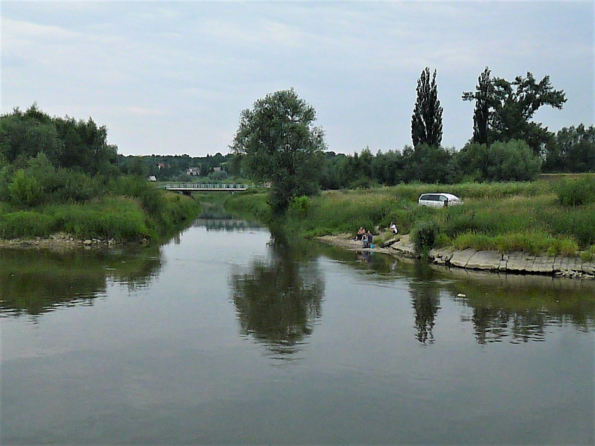 Koprzywianka, ujście do Wisły w Sandomierzu 2017-06-24